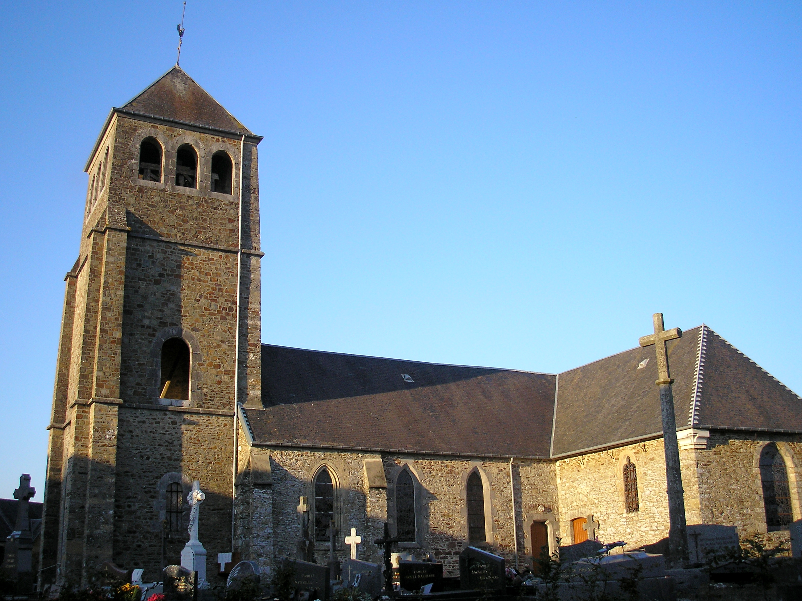 Cametours (Normandie, France). L'église Notre-Dame.